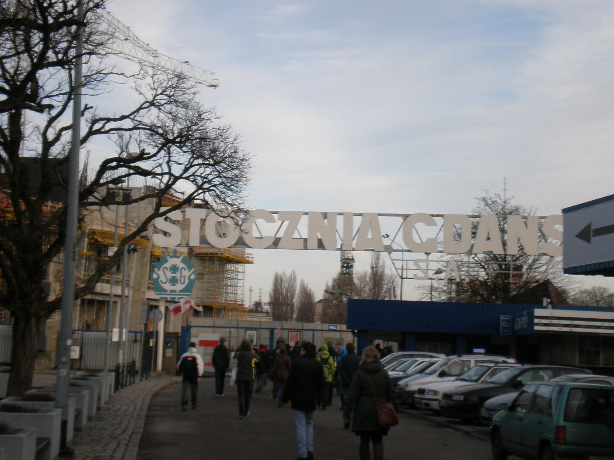 Η είσοδος των εγκαταστάσεων της Αλληλεγγύης στο Γκντάνσκ